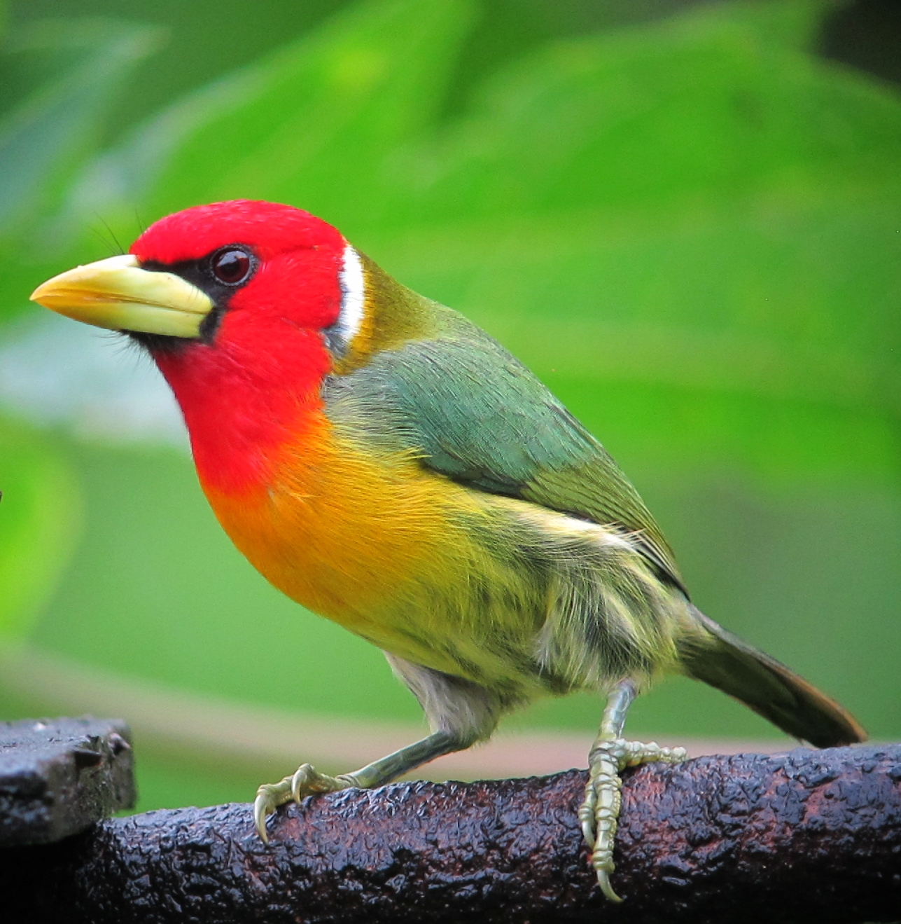 Pueblo Rico, Risaralda, Colombia ( Cerro Montezuma)